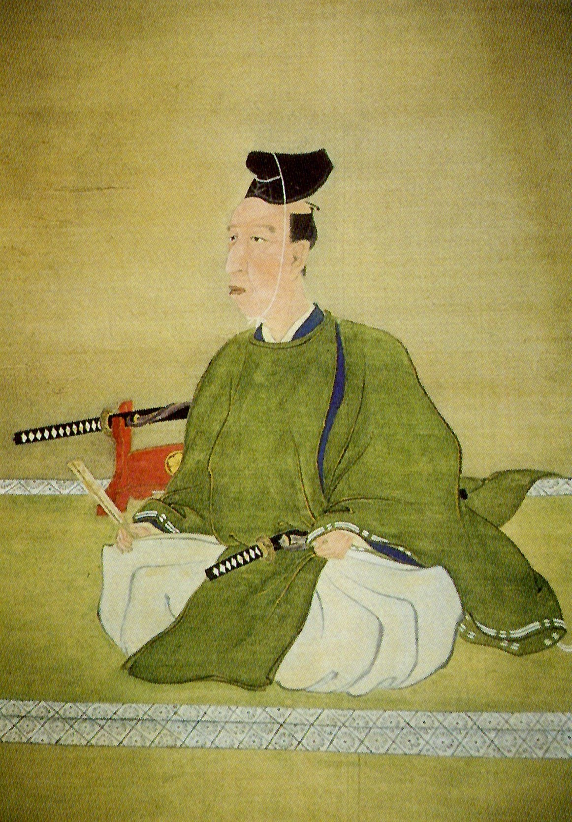 多久茂鄰の肖像。